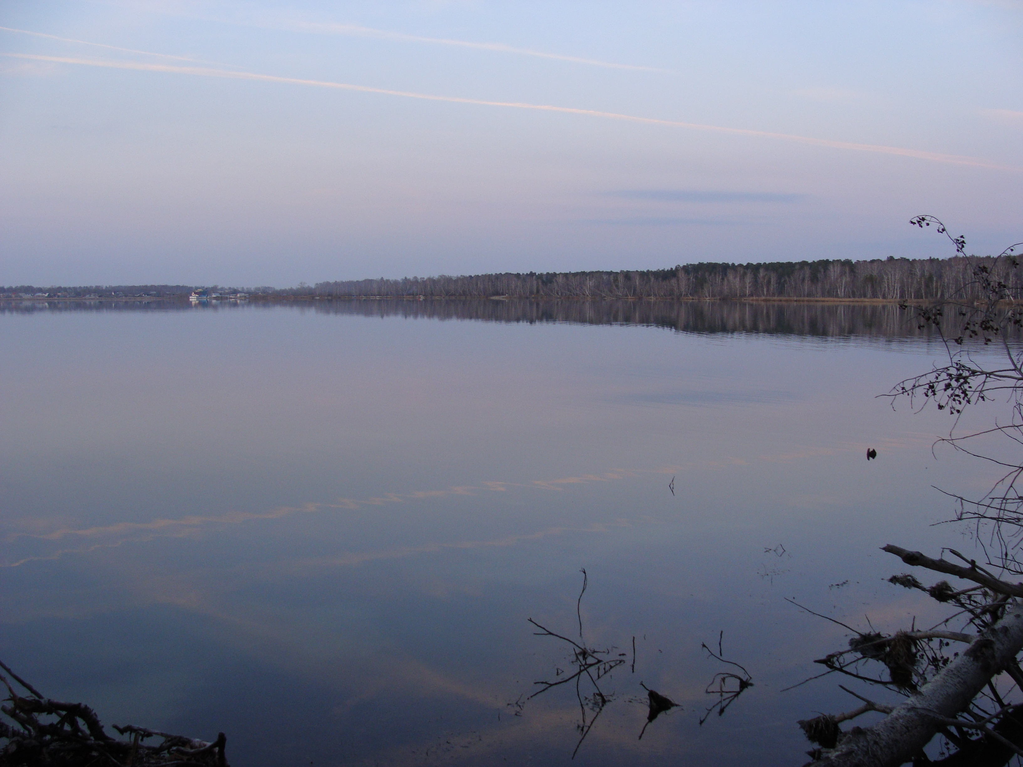 Озеро Селезян, Еткульский район This image is related to the protected area of Russia number 7410092